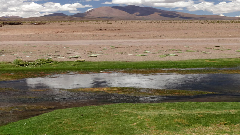 Bofedal en Bolivia